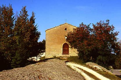 Autore: Marco Carobbi 2000 per progetto Elissa San Michele a Montemonaco (AP) Licenza: cc-by-sa 3 Ticket:2009021310026919